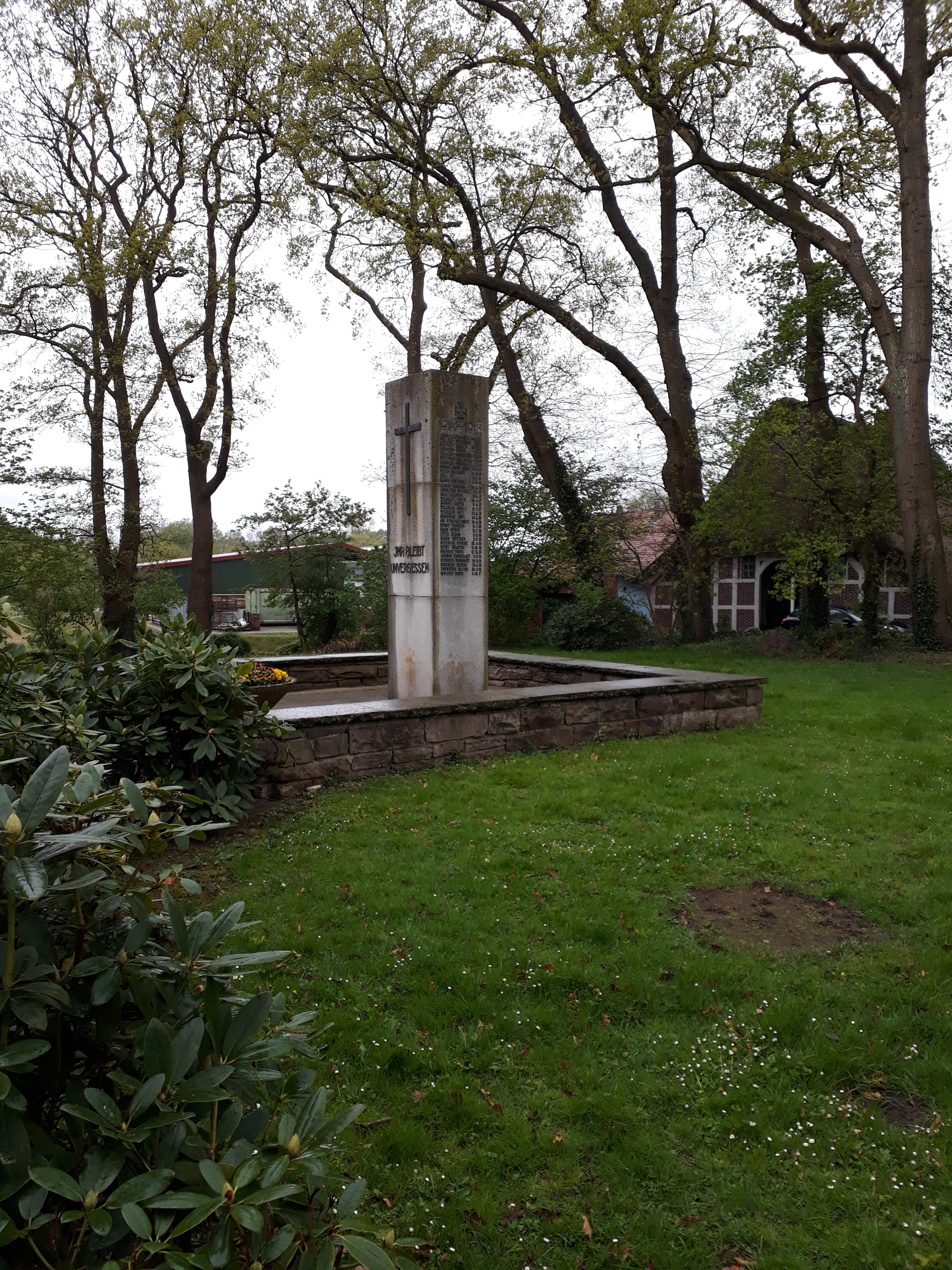 Kriegerdenkmal in Bargstedt, Kreis Stade (Nds.) an der Kirche St. Primus.